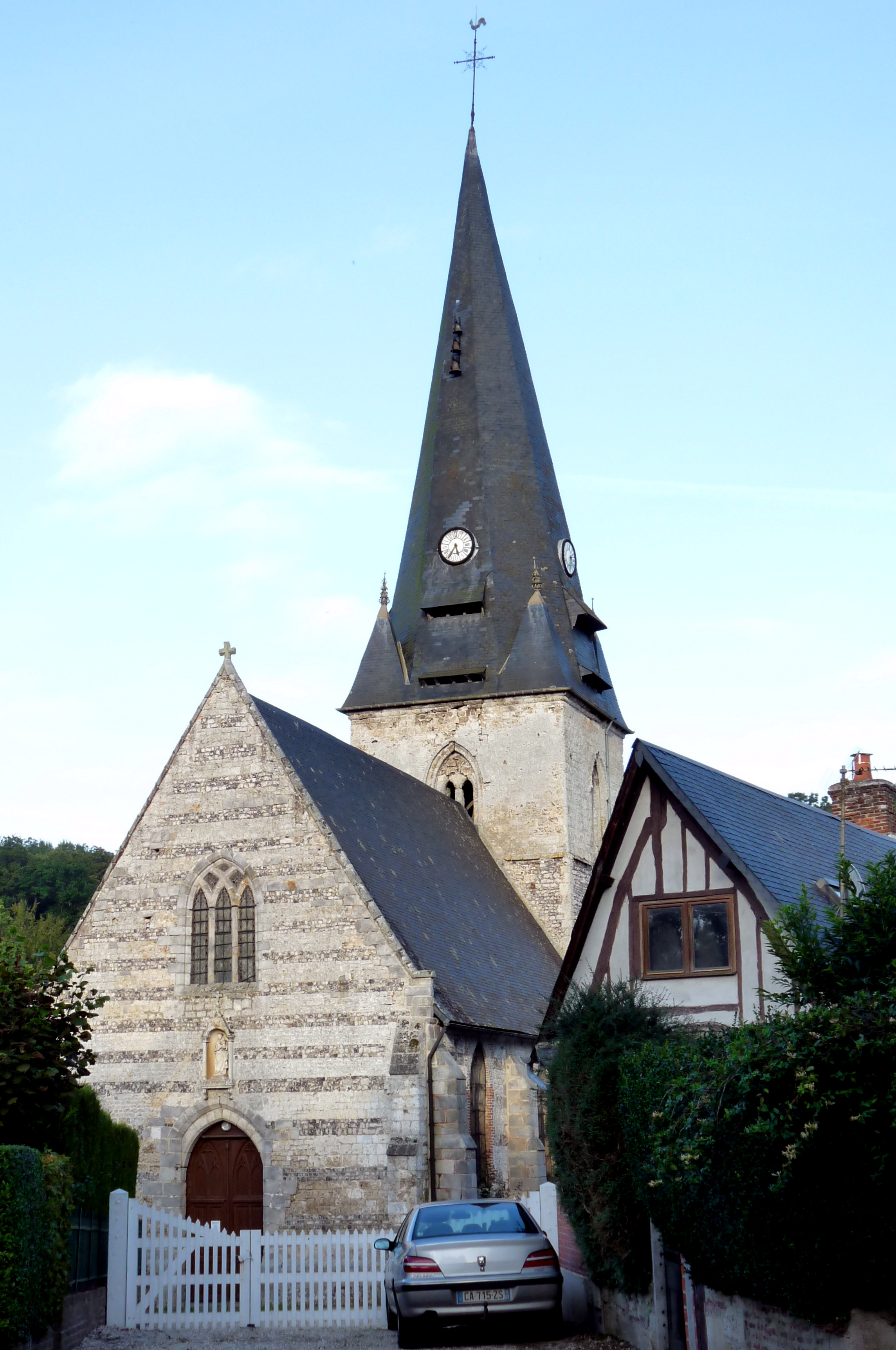 Église Notre-Dame de Lammerville (Inscrit) .